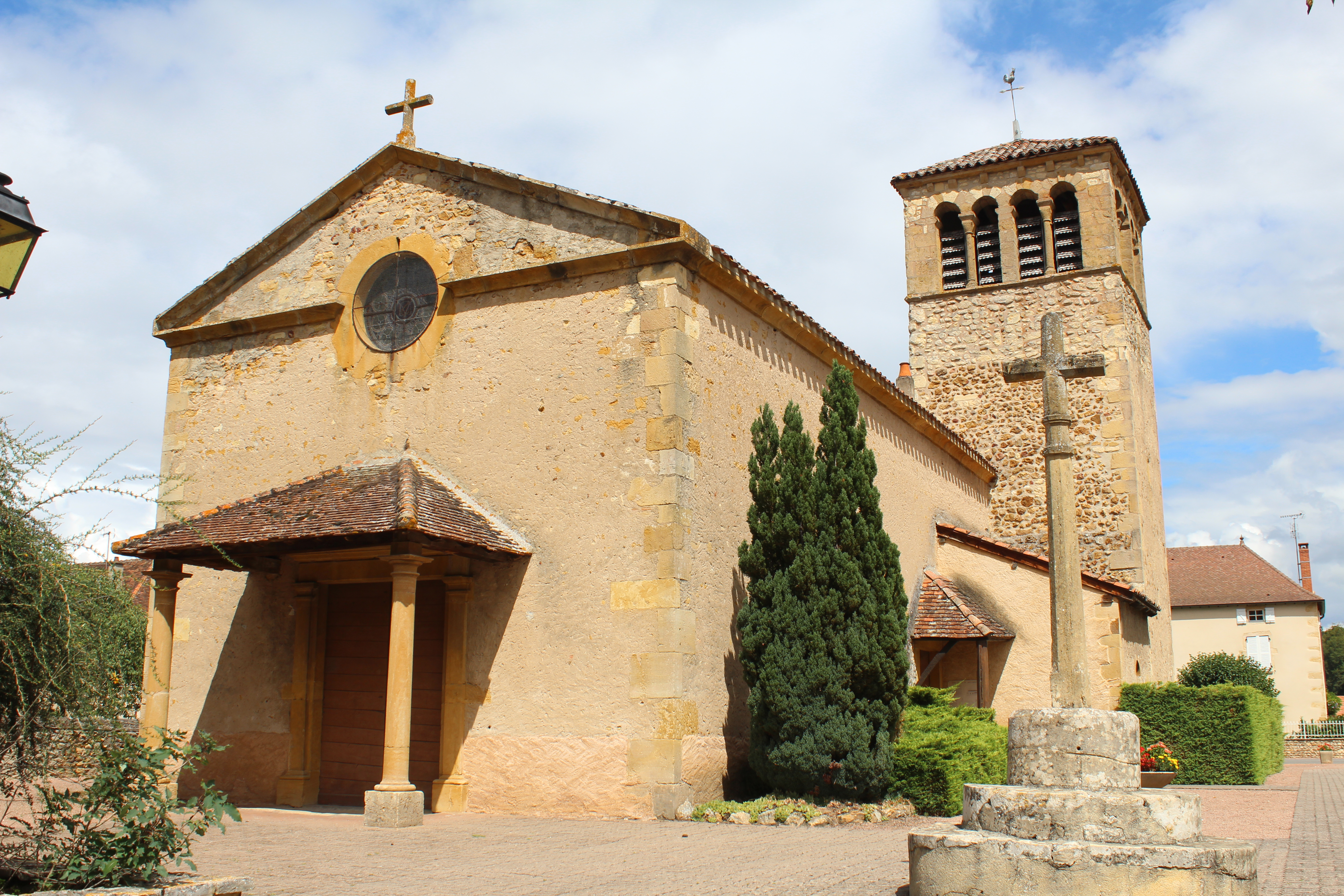 Église Saint-Martin de Saint-Martin-du-Lac.